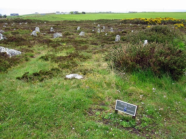 Возникновение одного из самых таинственных археологических объектов Шотландии Hill O Many Stanes относится примерно к 2 тысячелетию до нашей эры. Расположены ряды камней на холме около поселка Clyth, недалеко от побережья залива Мари-Ферт Северного моря цель их создания в Бронзовом веке точно не известна, а объяснения причин варьируются от религиозных и церемониальных до астрономических и эстетических.